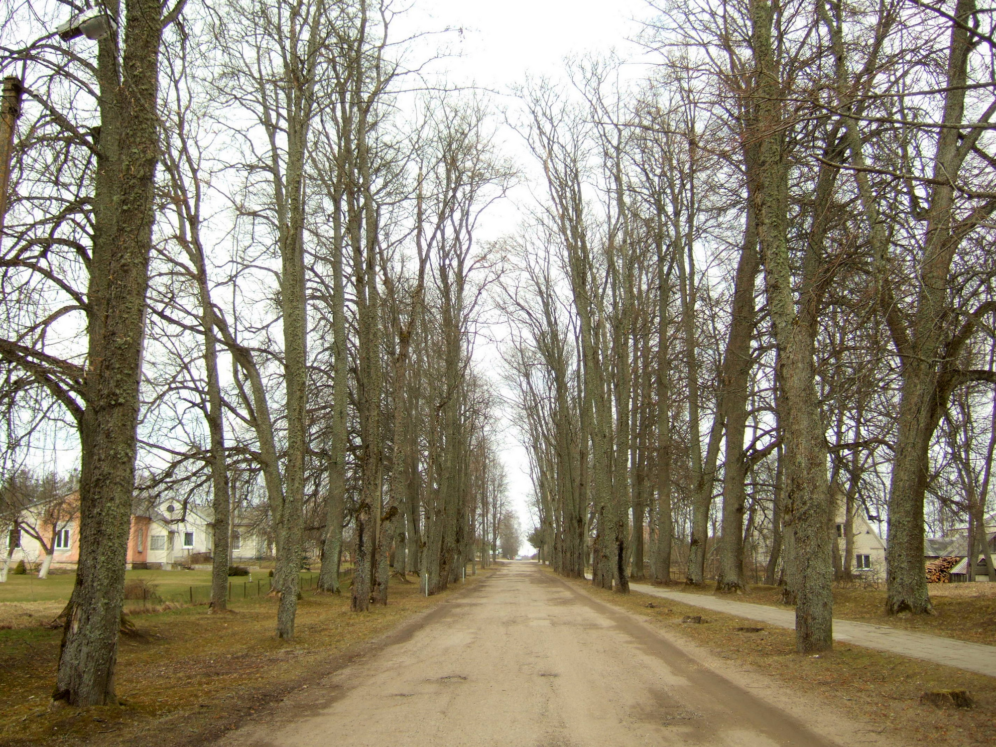 Cirkliškio rūmų pagrindinė alėja